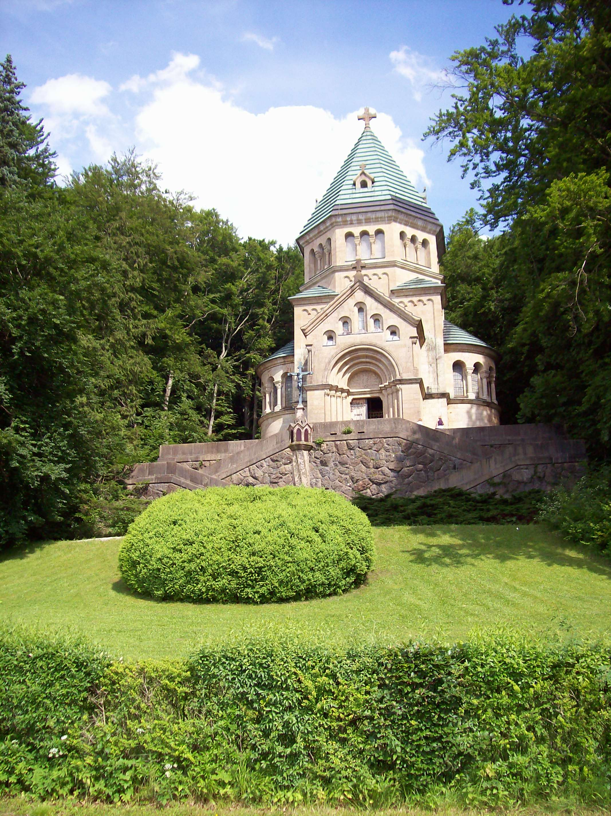 Chapelle à Berg, construit pour Louis II de Bavière